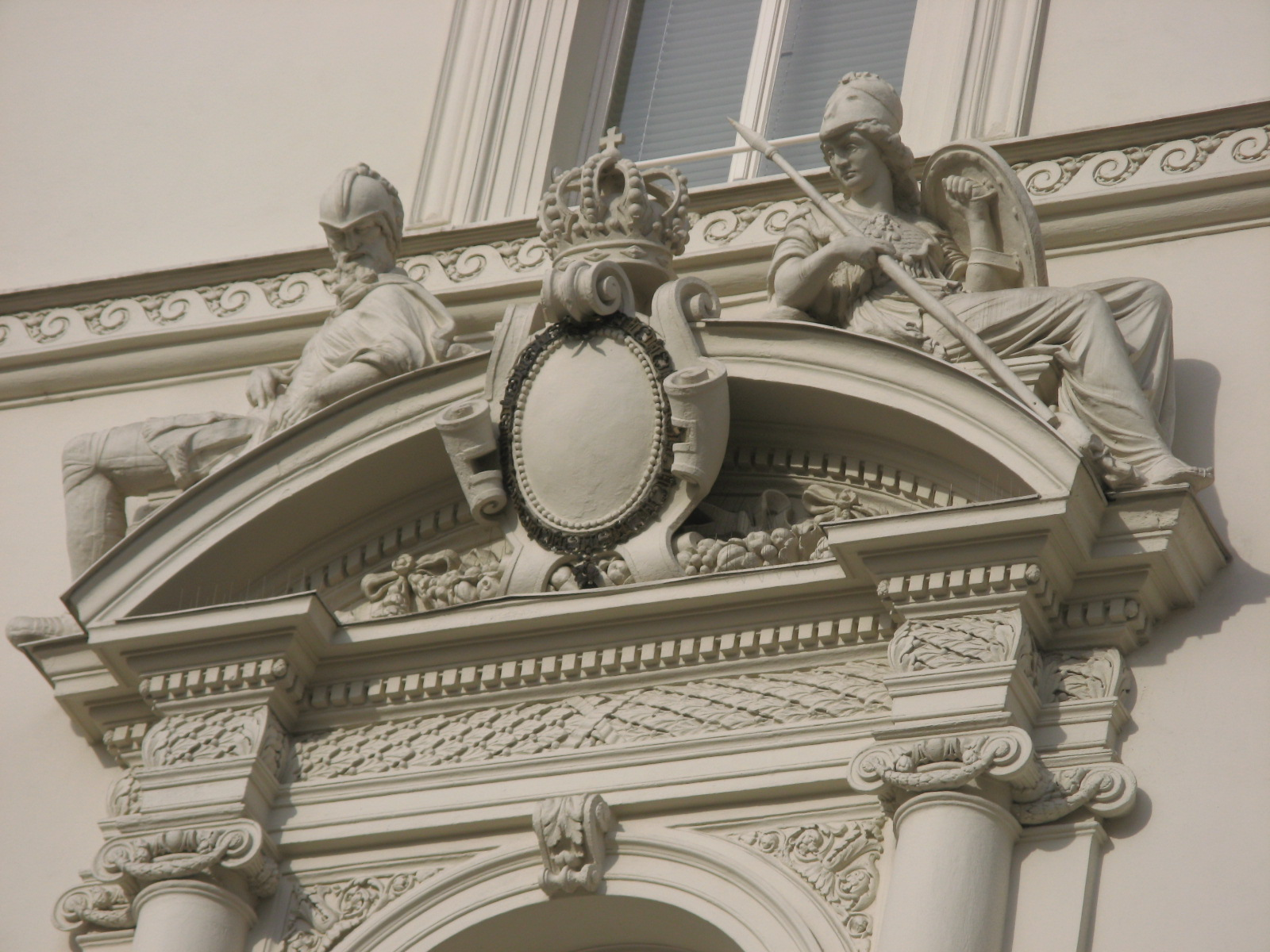 Ehemaliges Lützow-Palais, Bösendorferstraße 13, Wien 1